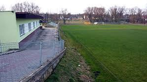 Zdjęcie przedstawia stadion Polonii Iłża przy ul. Podzamcze 47